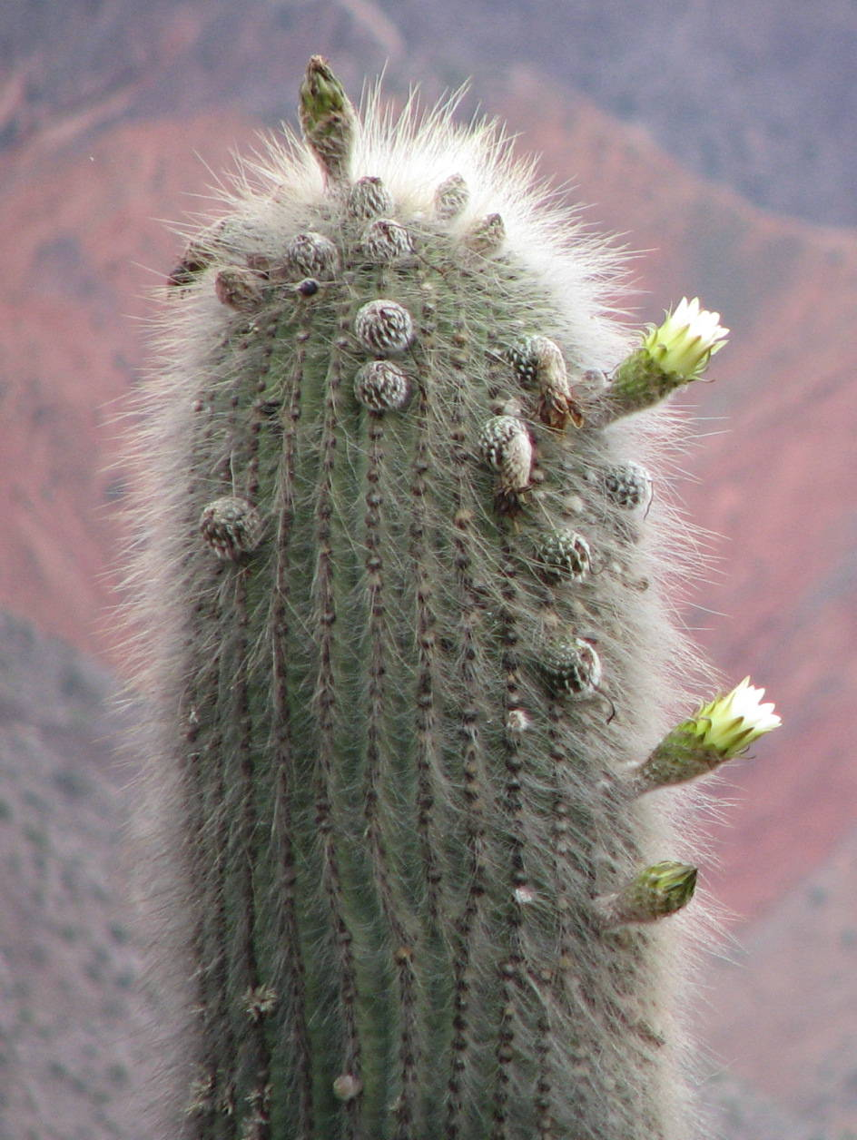 Fleurs de cactus Echinopsis atacamensis subsp. pasacana (cardón), à Tilcara